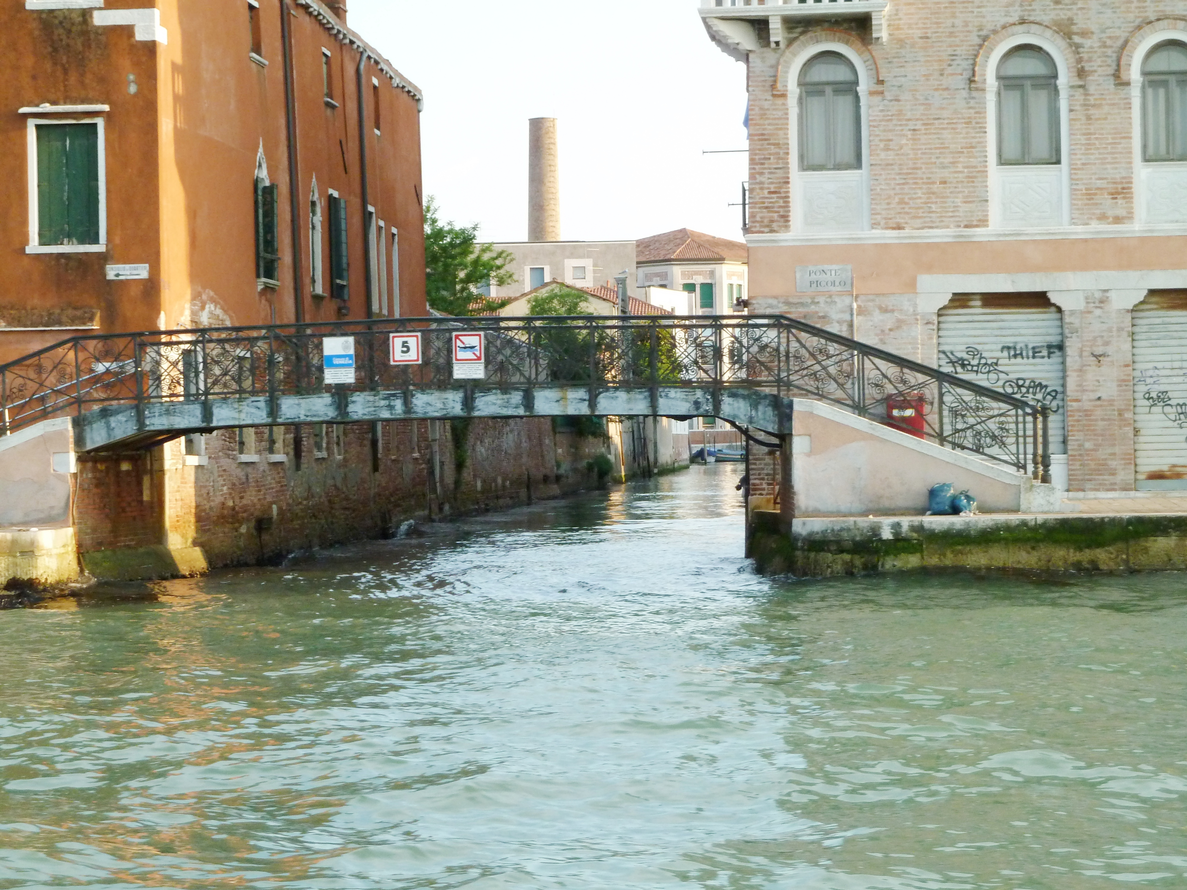 Ponte Piccolo (Venice)